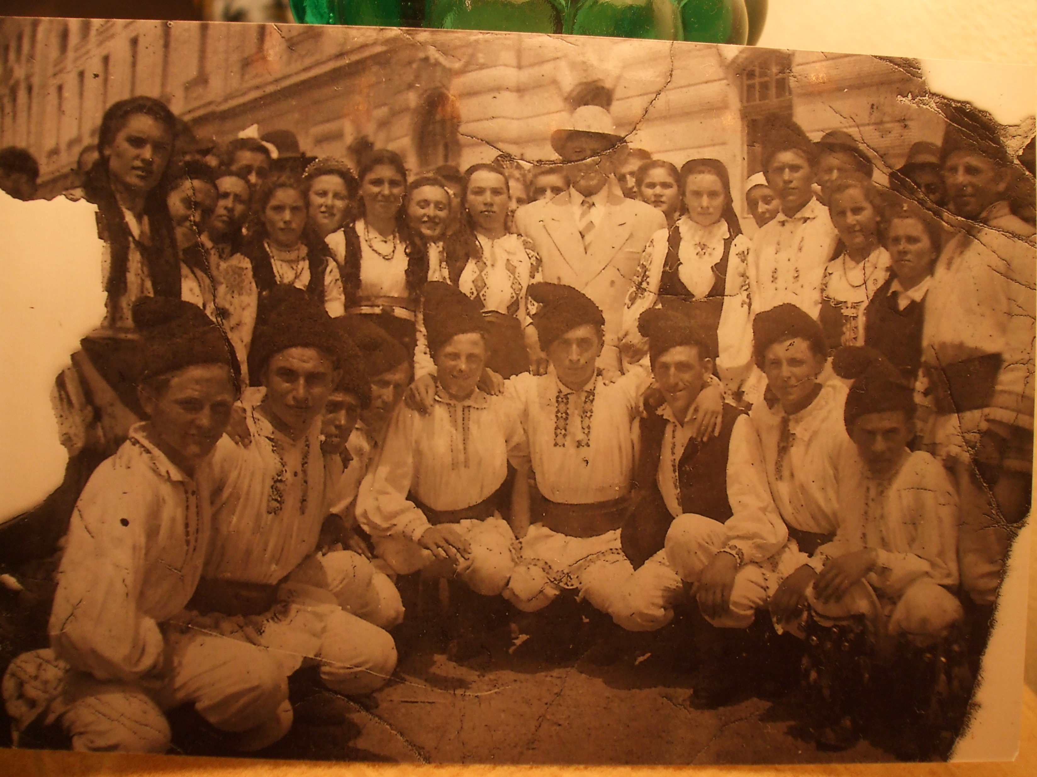 Dr.Petru Groza în mijlocul grupului de dansatori din Aruncuta (fotografie realizată în fața Teatrului Național din Cluj , în anul 1953, cînd acesta deținea funcția de șef al statului)